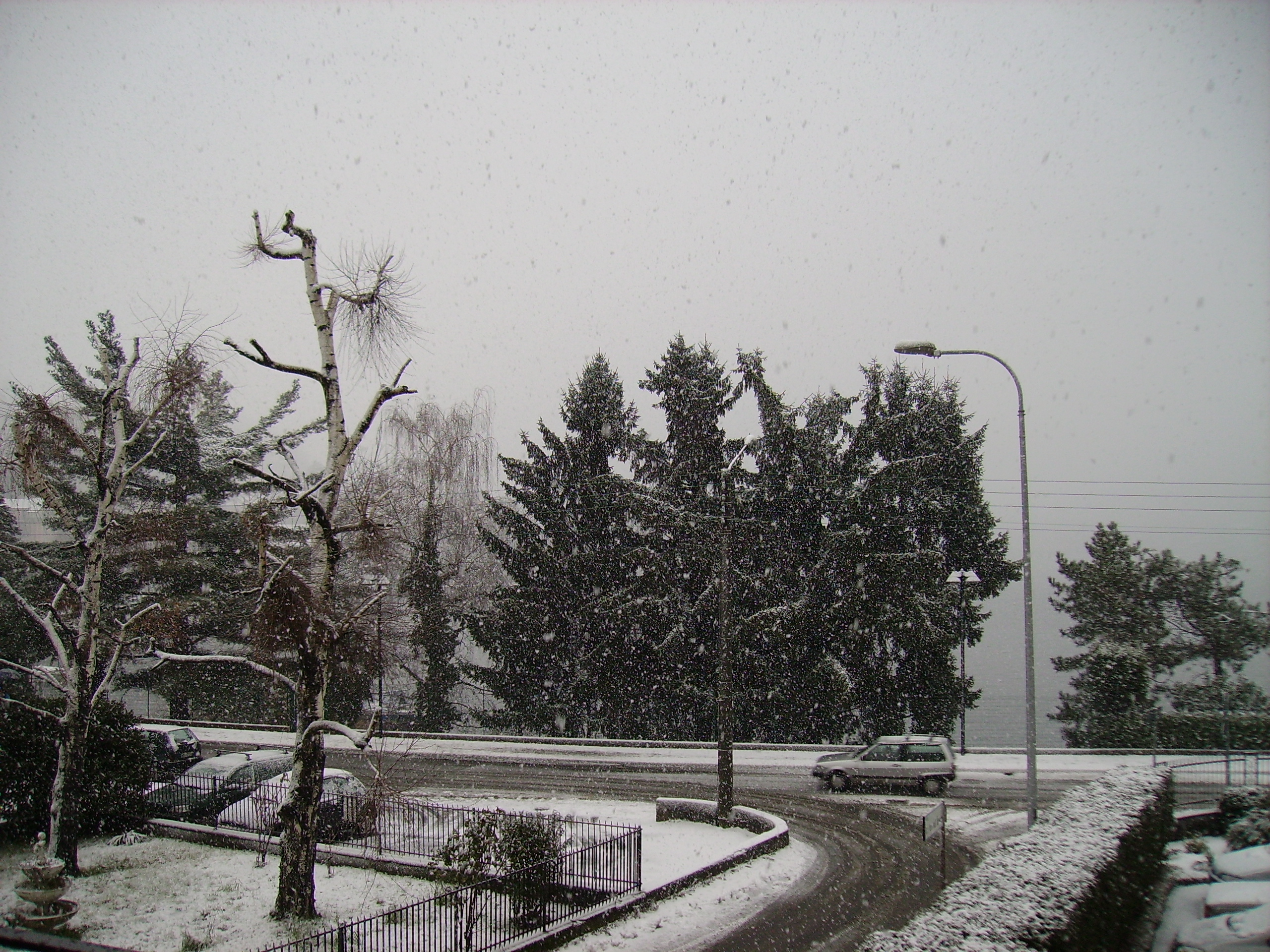 Bagnella sotto la neve.